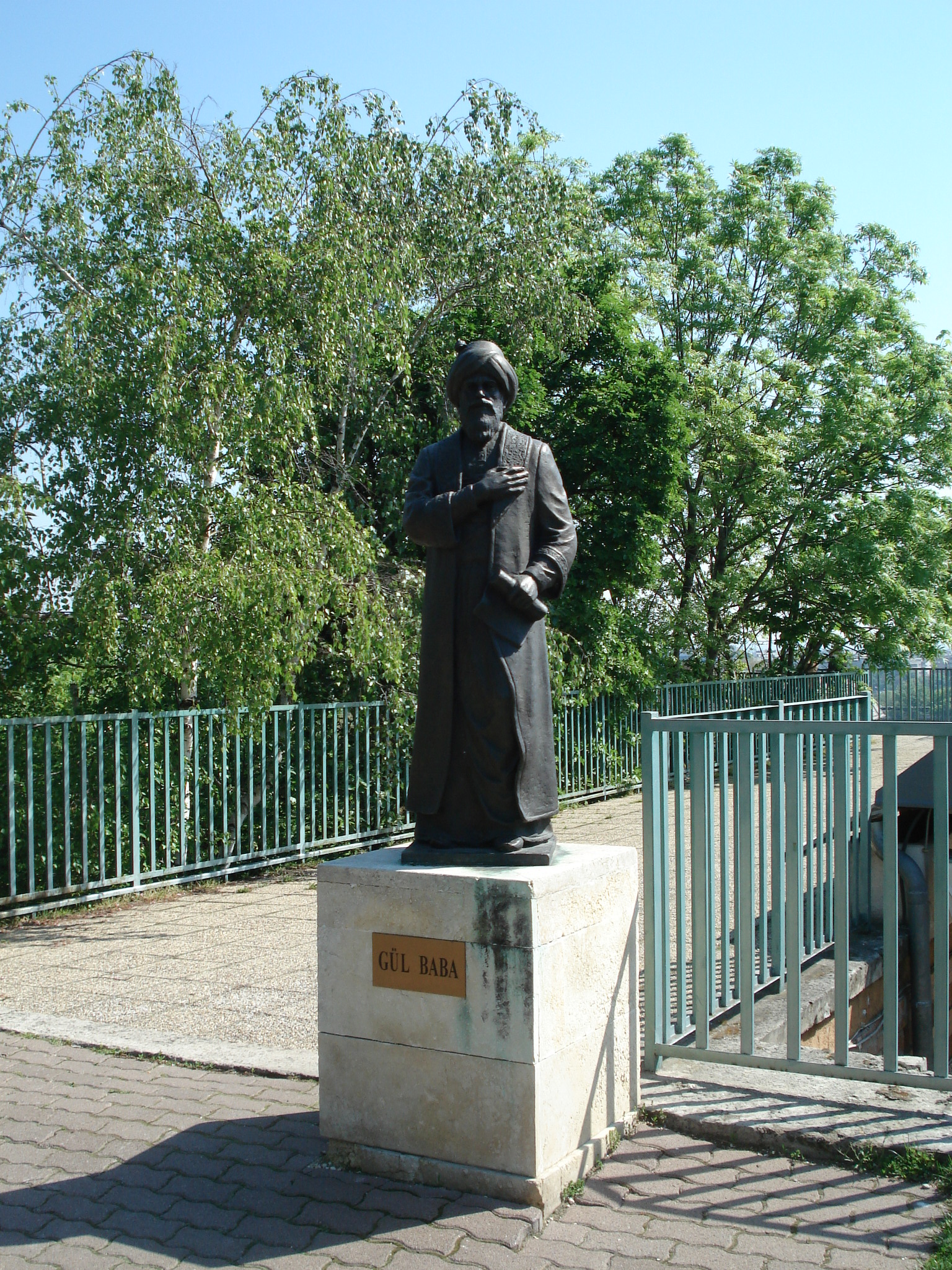 Gül Baba Heykeli